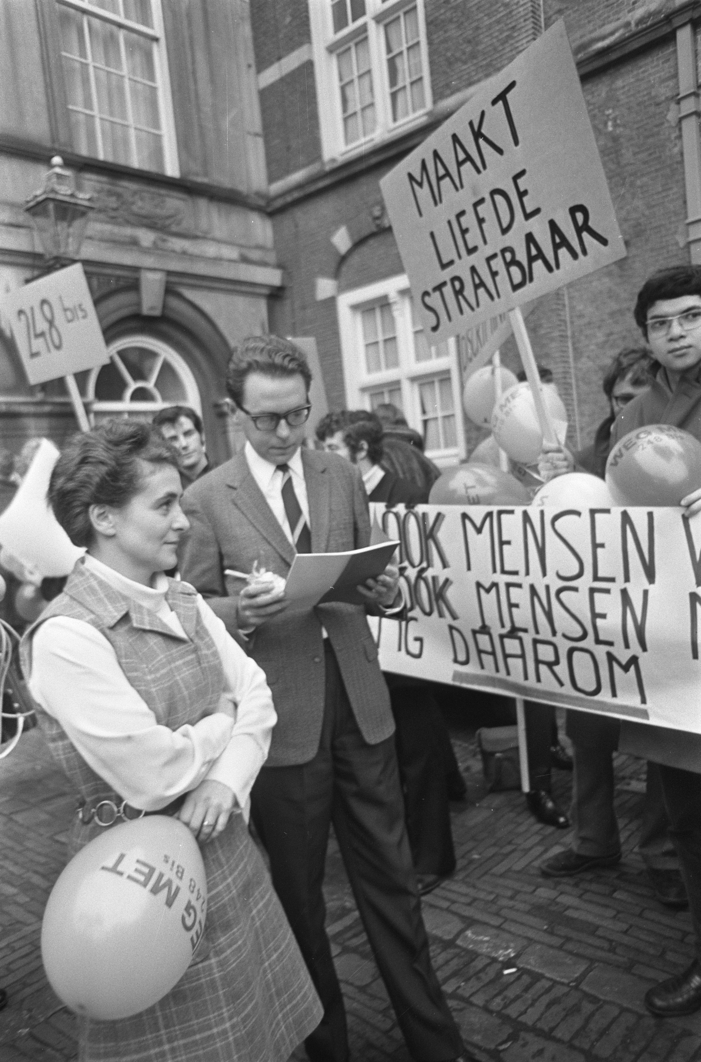 Manifestazione omofila All'Aia (Olanda), il 21 gennaio 1969. Foto di Jac. de Nijs / Anefo.